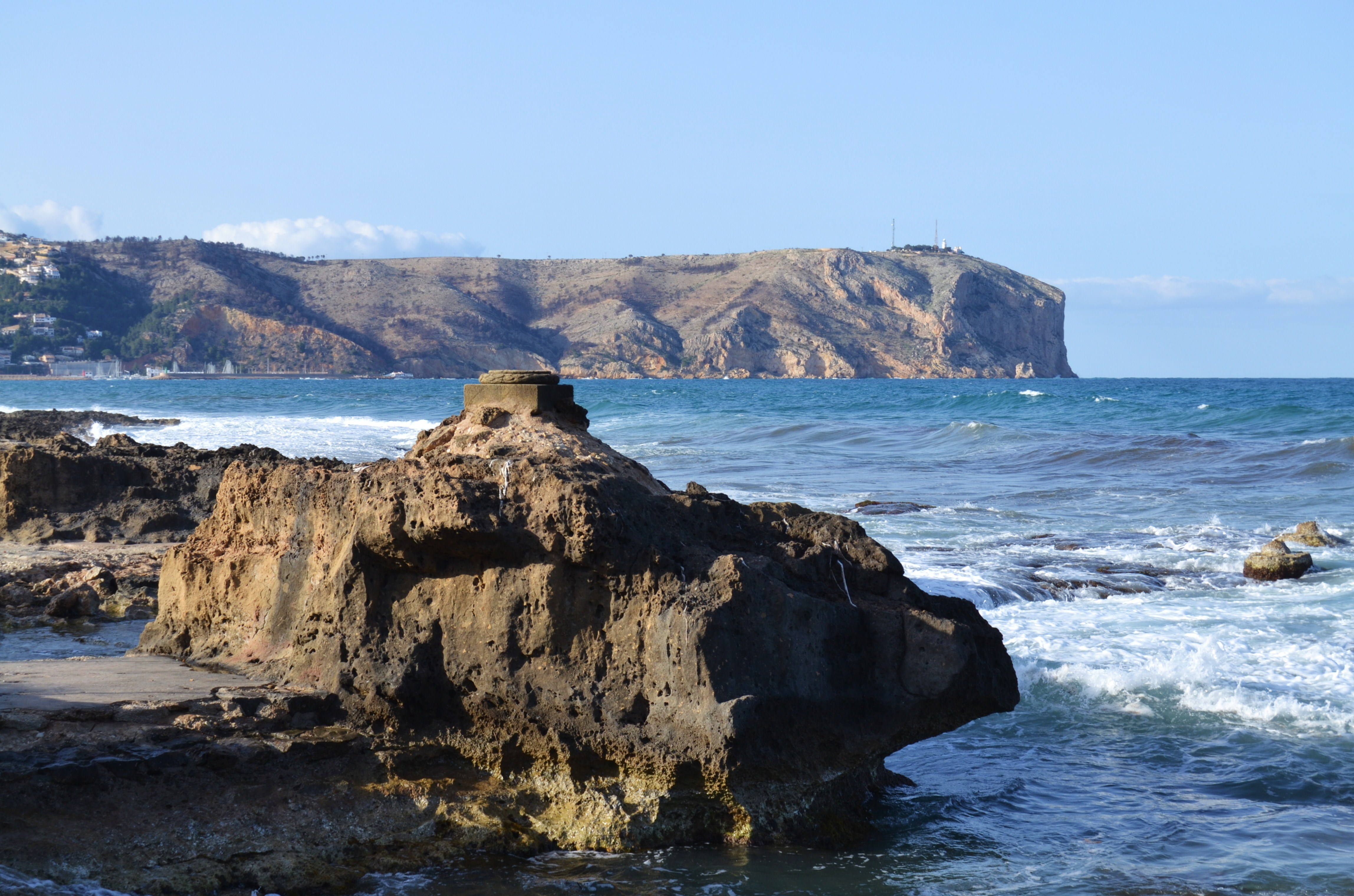 Roca a la cala del Ministre amb el cap de sant Antoni al fons, Xàbia.